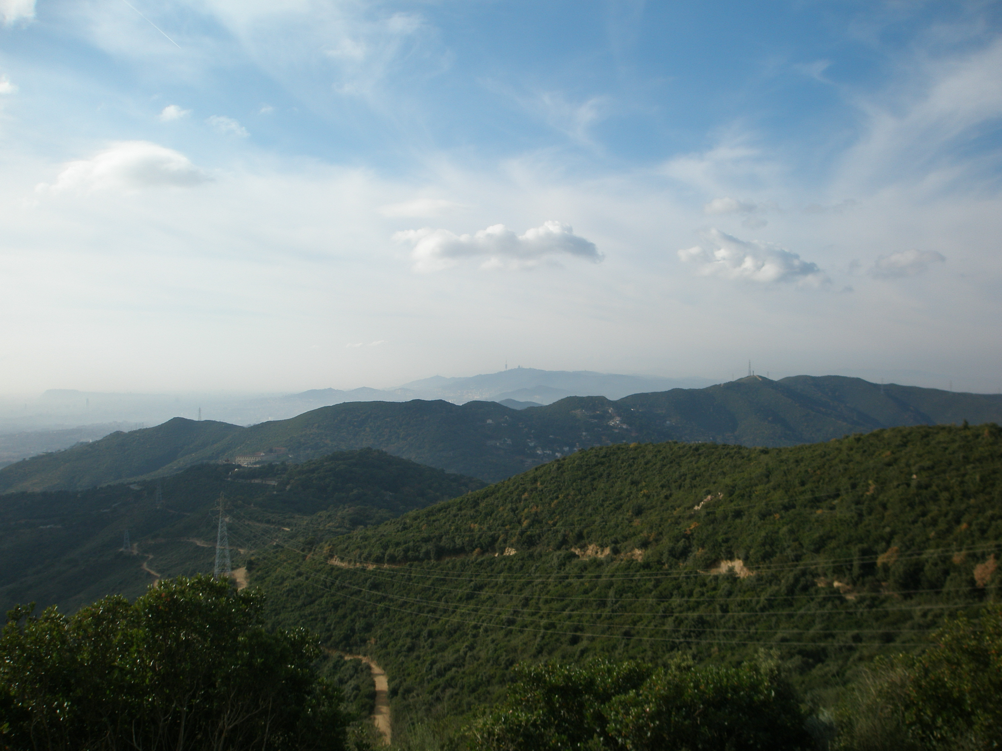 Vista des de turo Galzeran